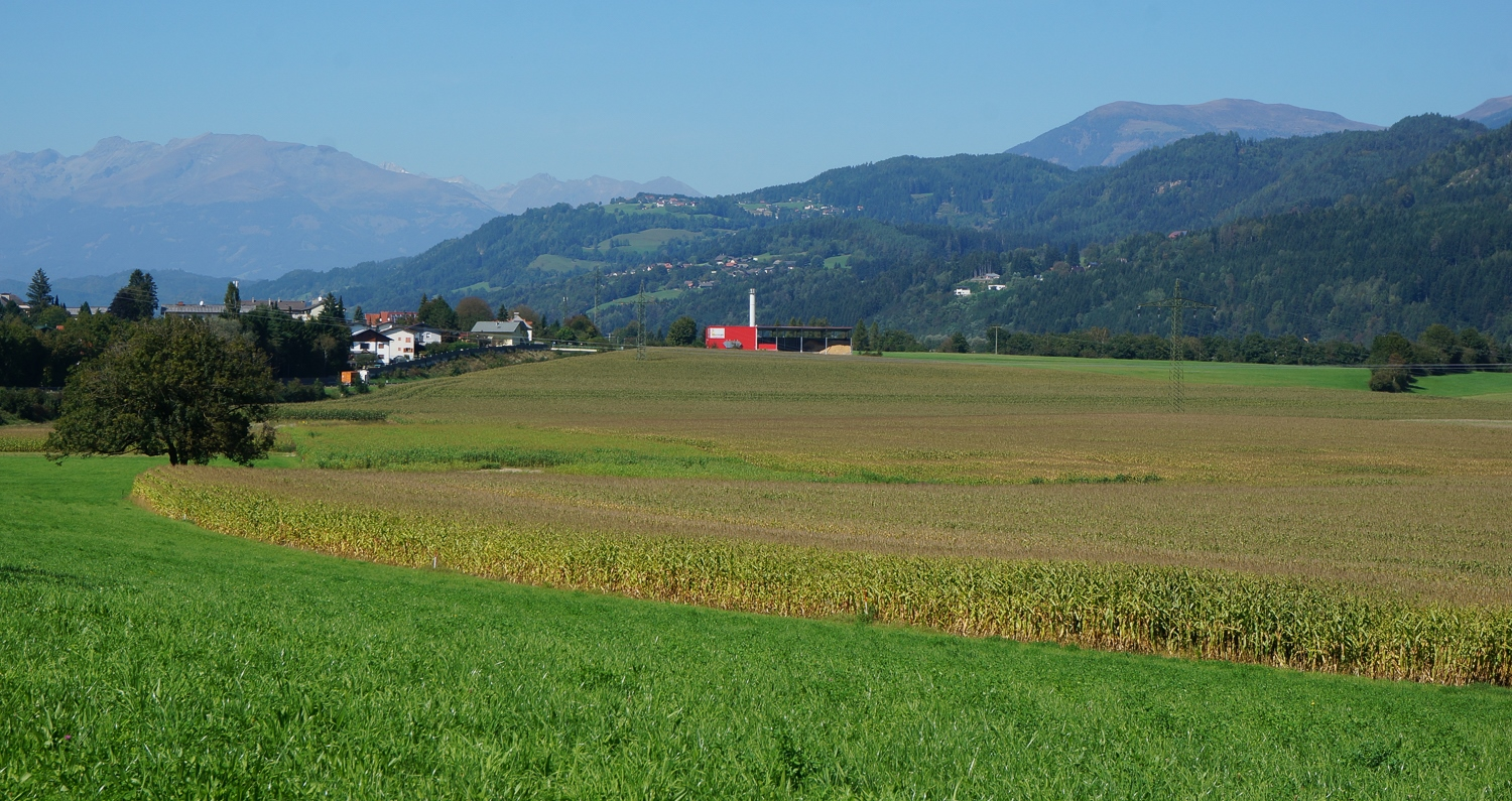 Feffernitz, Marktgemeinde Paternion, Blick Richtung Norden, Bioenergie im Bezirk Villach Land, Kärnten, Österreich, Europäische Union